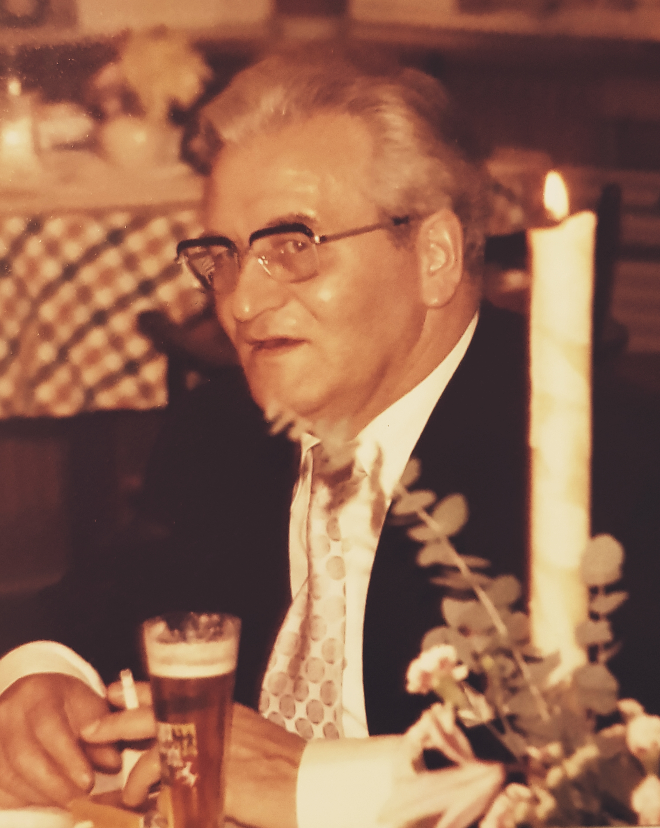 Quelle: privat